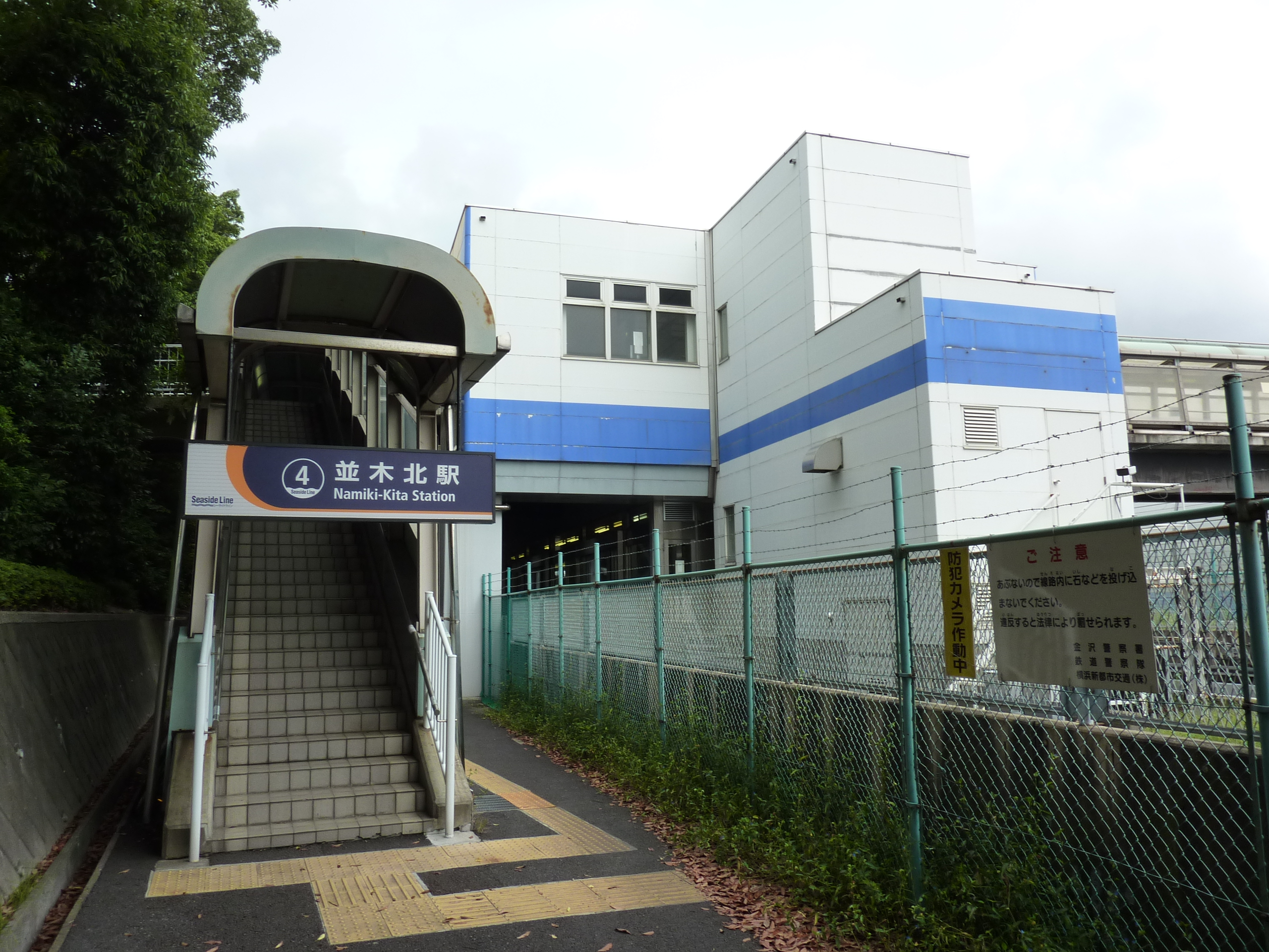 2012年9月17日に投稿者が並木北駅で撮影。